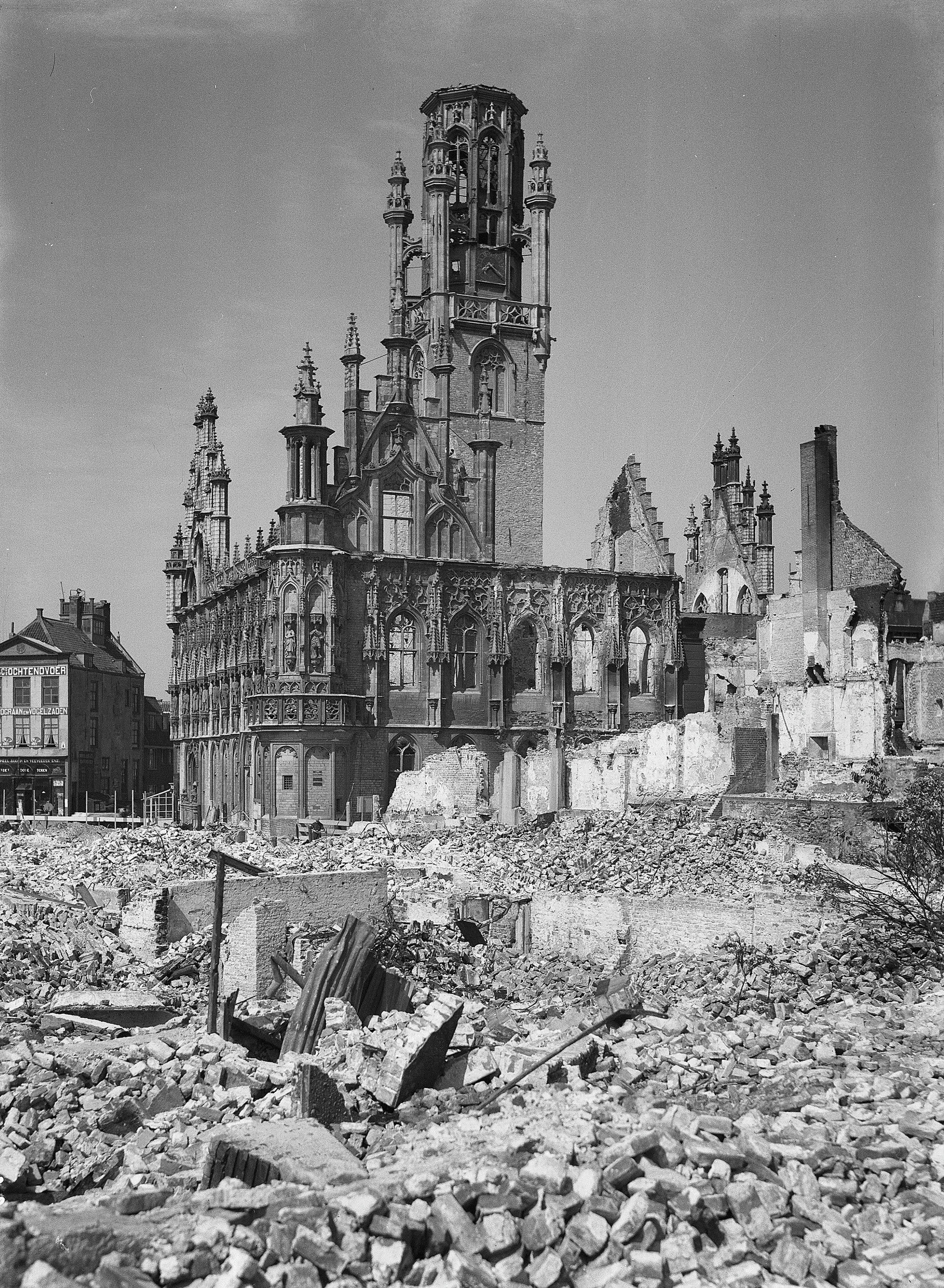 Stadhuis: na de verwoesting